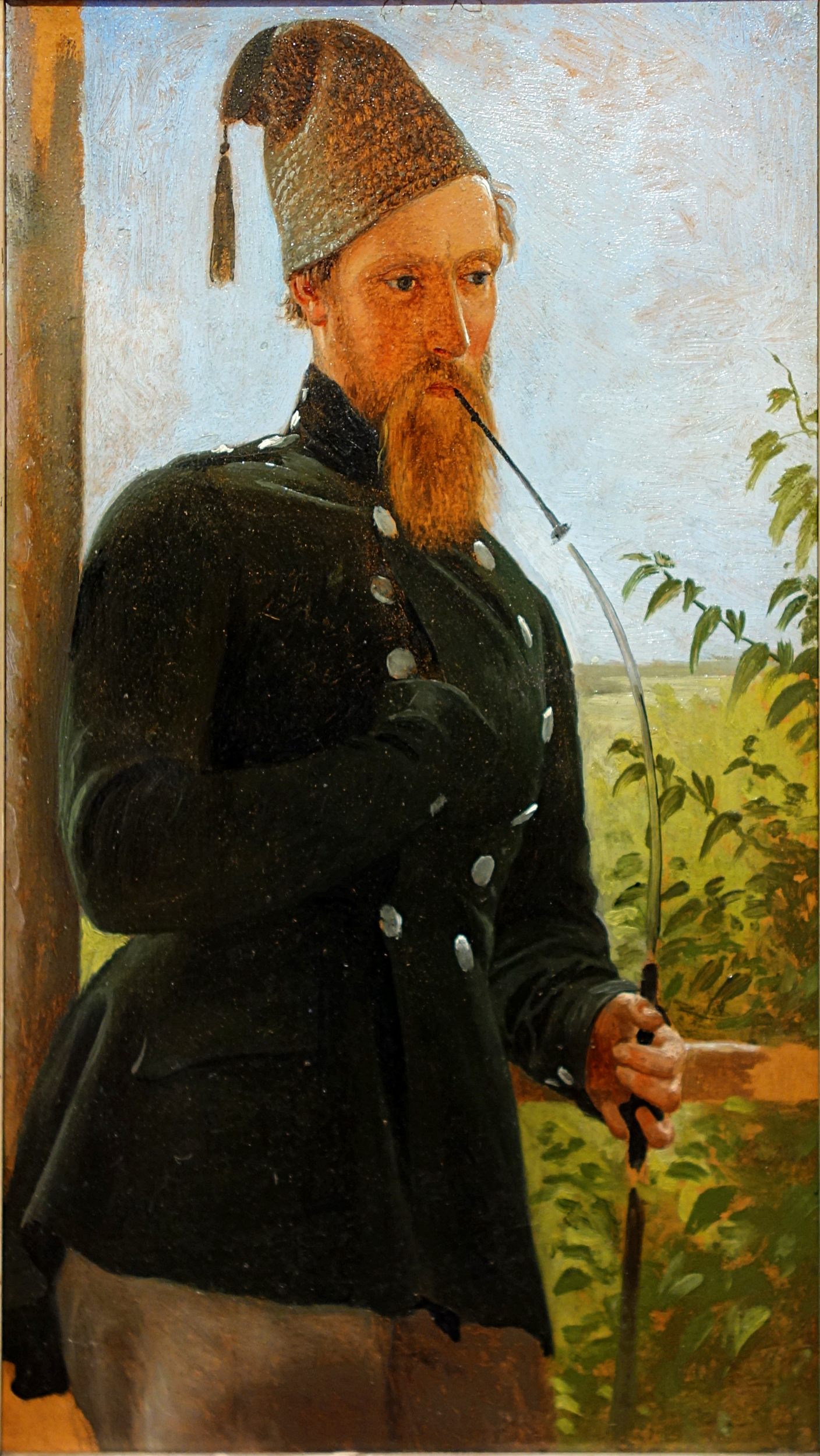 Portrait de l'artiste par lui-même